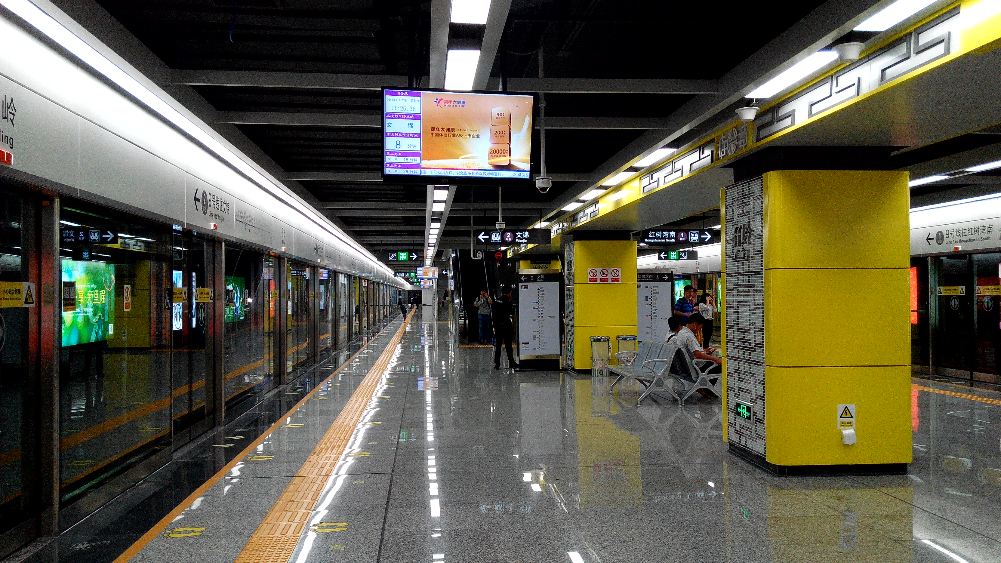 深圳地铁9号线 孖岭站站台